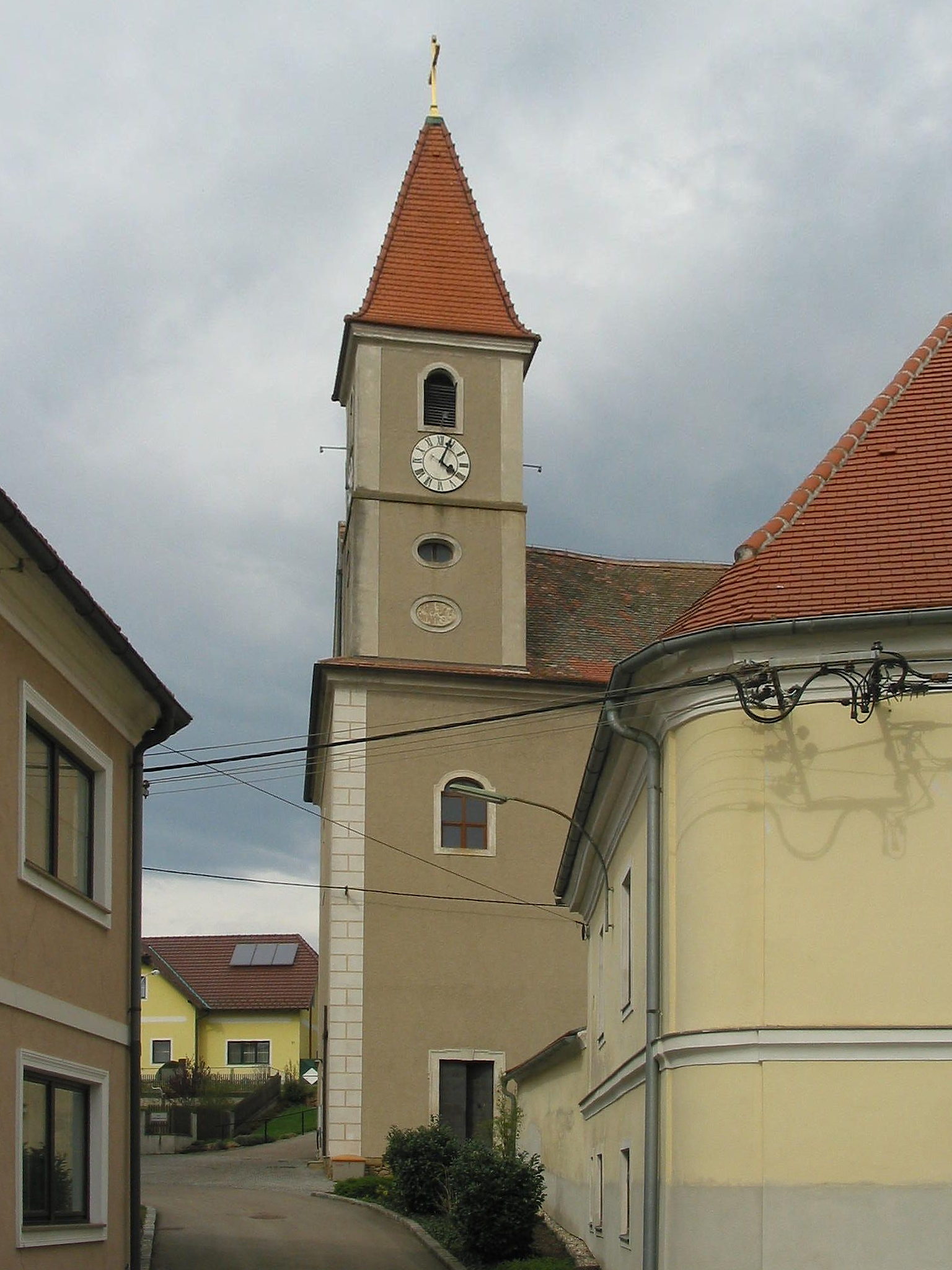 katholische Pfarrkirche heiliger Jakobus der Ältere